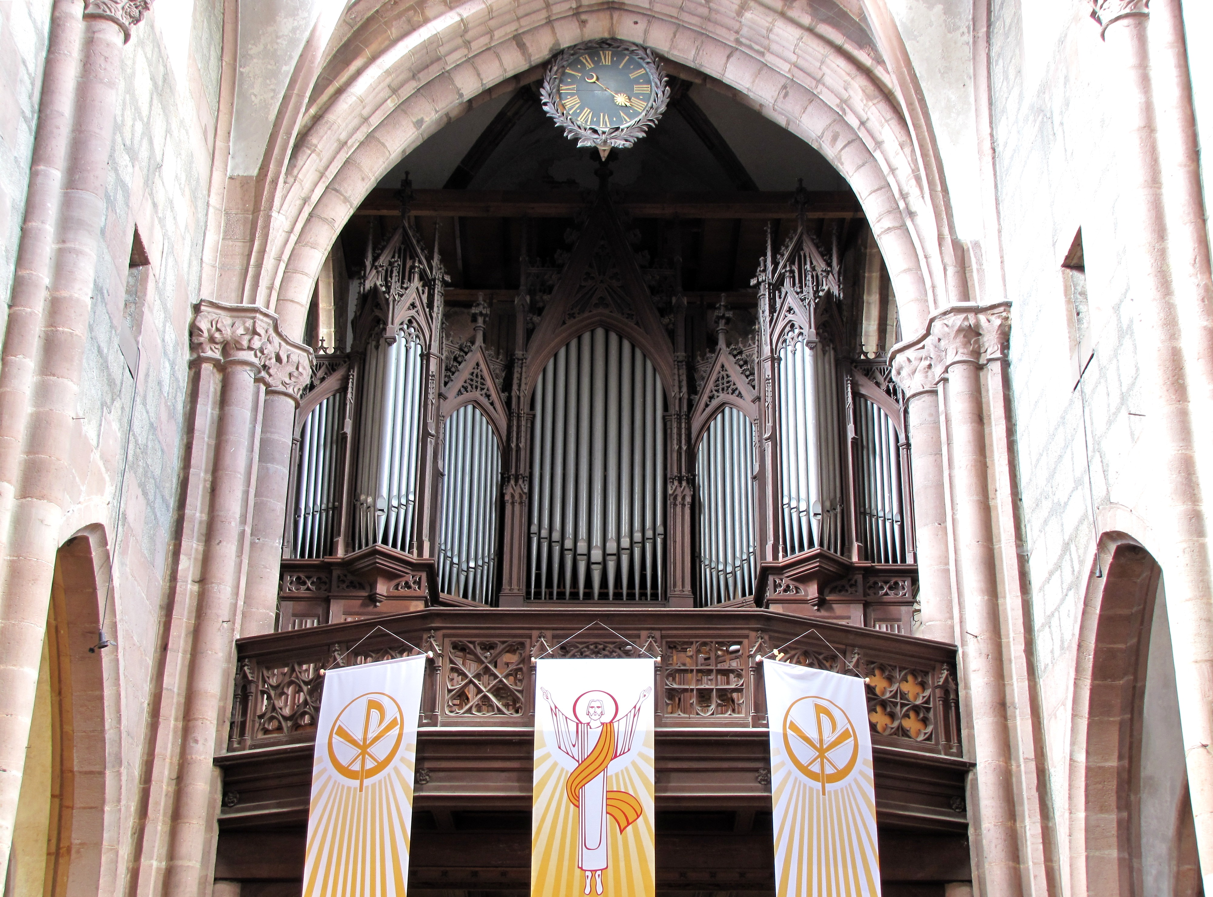 Alsace, Bas-Rhin, Sélestat, Église Saint-Georges (PA00084978, IA00124588). Orgue de Martin Rinckenbach et son garde-corps néo-gothique de Théophile Klem (1896)